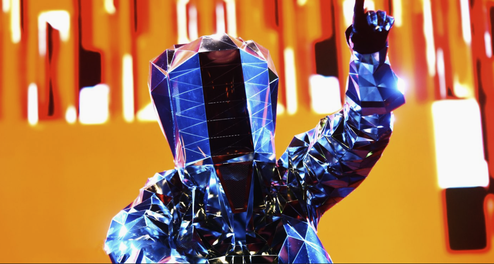 Hitchhiker Live In SXSW